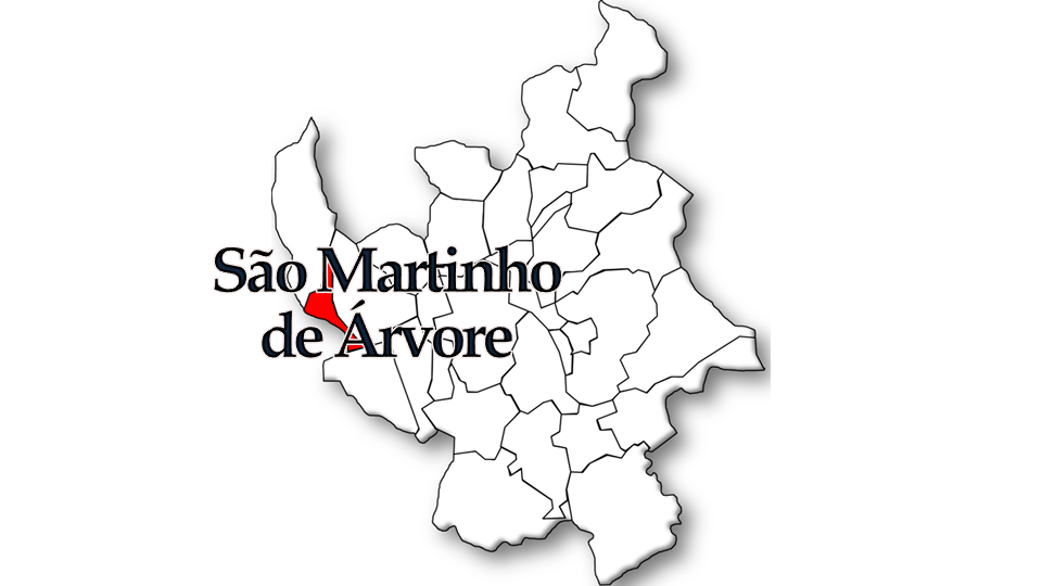 População